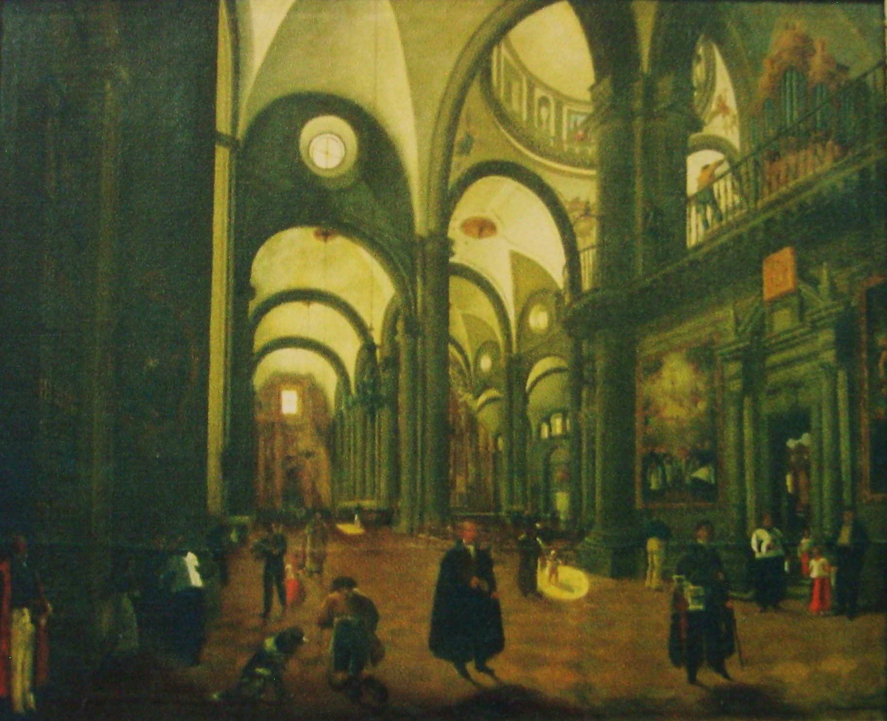 Nave del evangelio de la catedral de Puebla, pintura al óleo de José Manzo s. XIX.